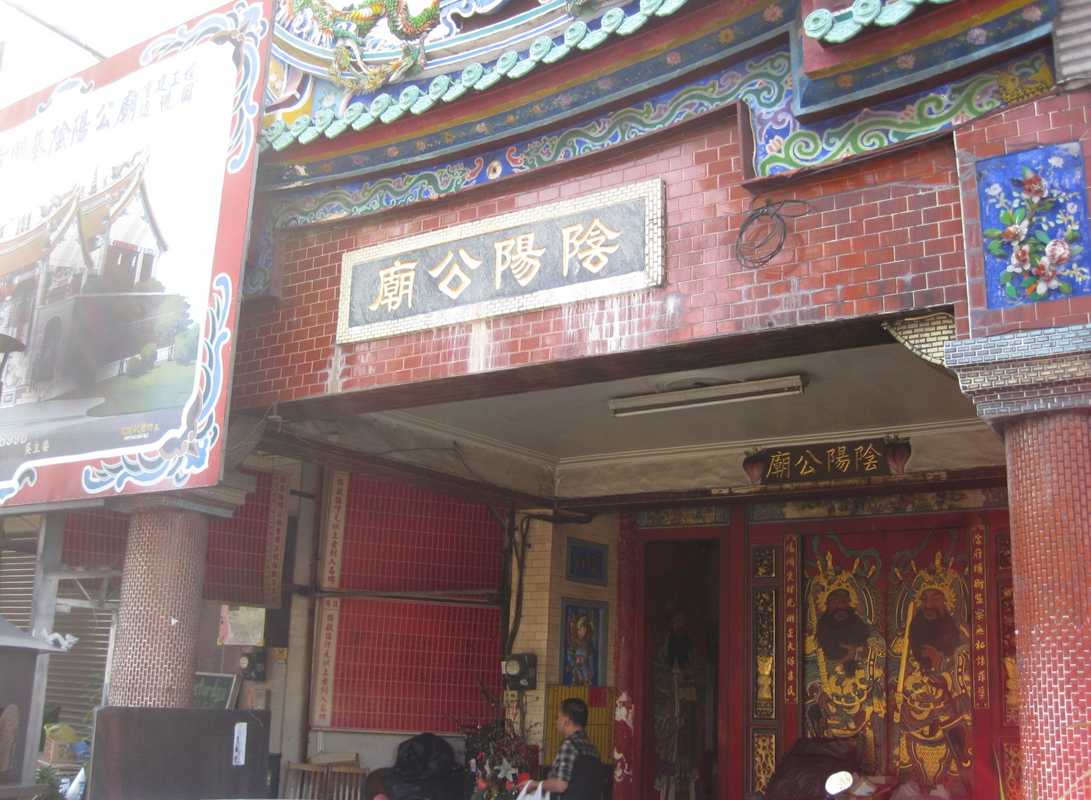 2010年的開基陰陽公廟，當時尚未重建。